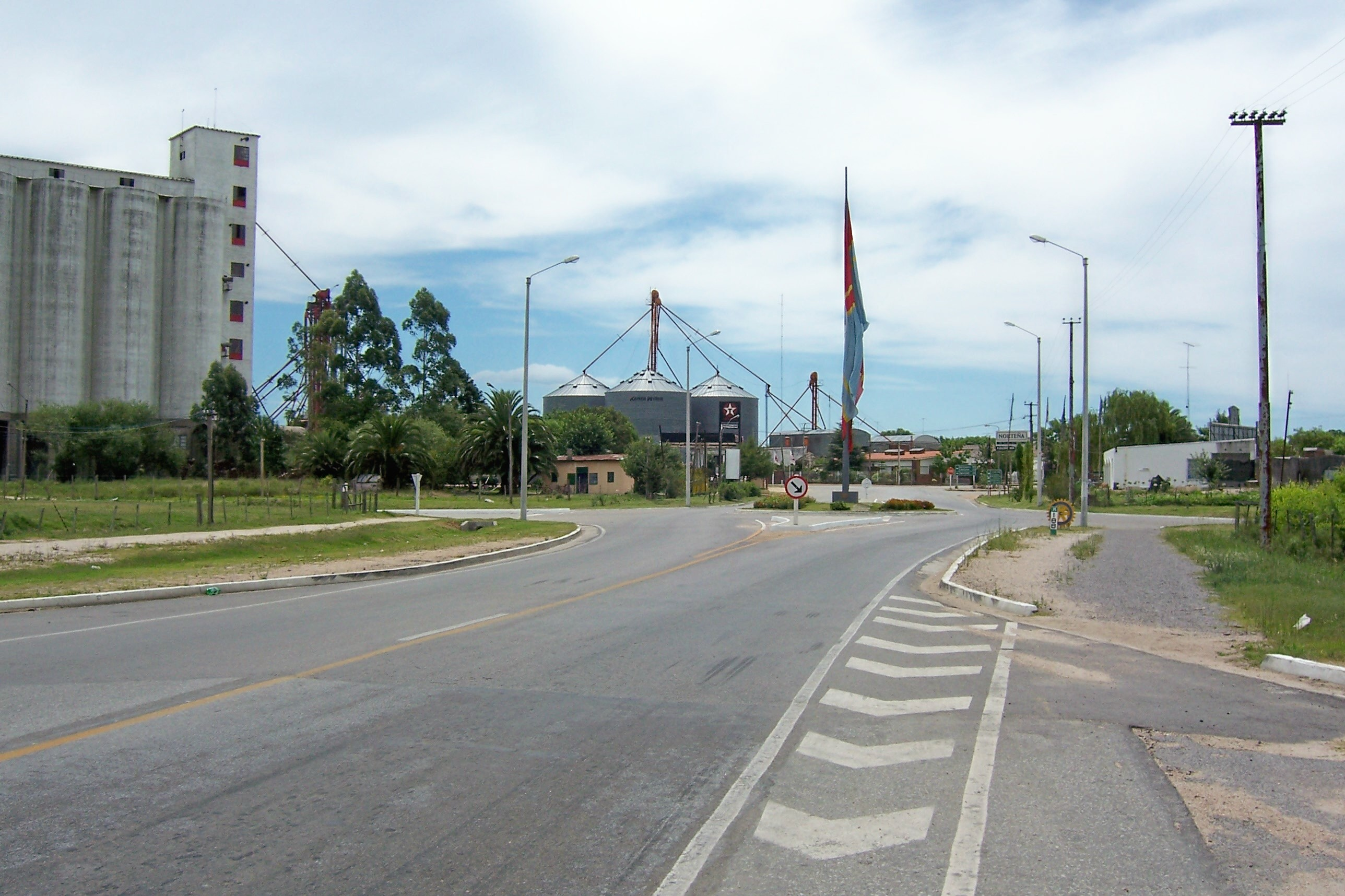 Entrada sur a la ciudad uruguaya de Trinidad, por la ruta 3.